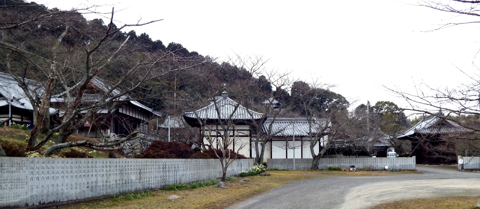 久妙寺の全景